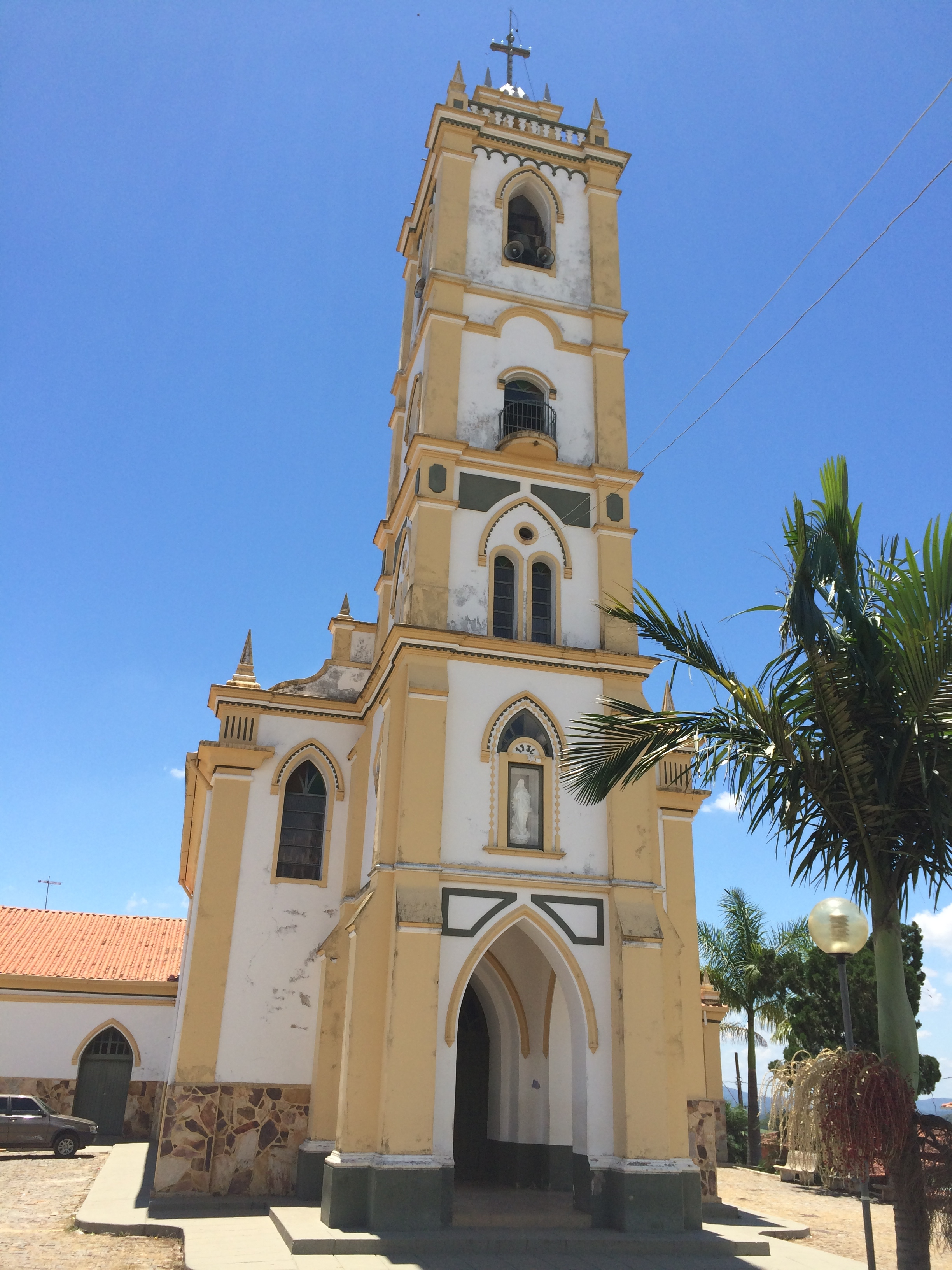 Igreja Matriz de Nossa Senhora das Necessidades- Piracema, MG